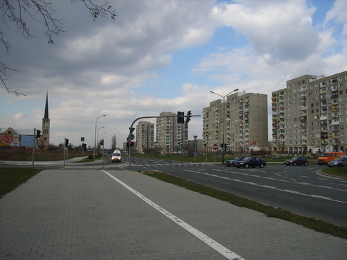 Osiedle Piekary w Legnicy